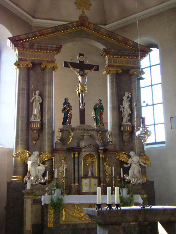 Valentinskirche in Rohrbach am Gießhübel, Hauptaltar